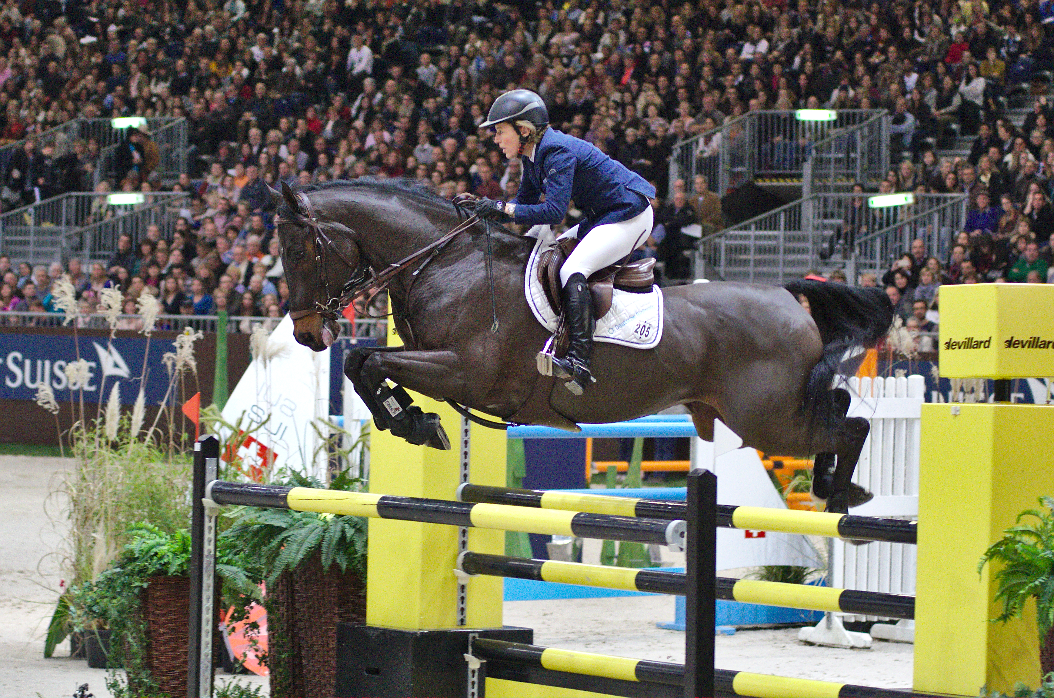 54eme CHI de Genève - 20141213 - Prix Credit Suisse - Meredith Michaels-Beerbaum et Checkmate 4